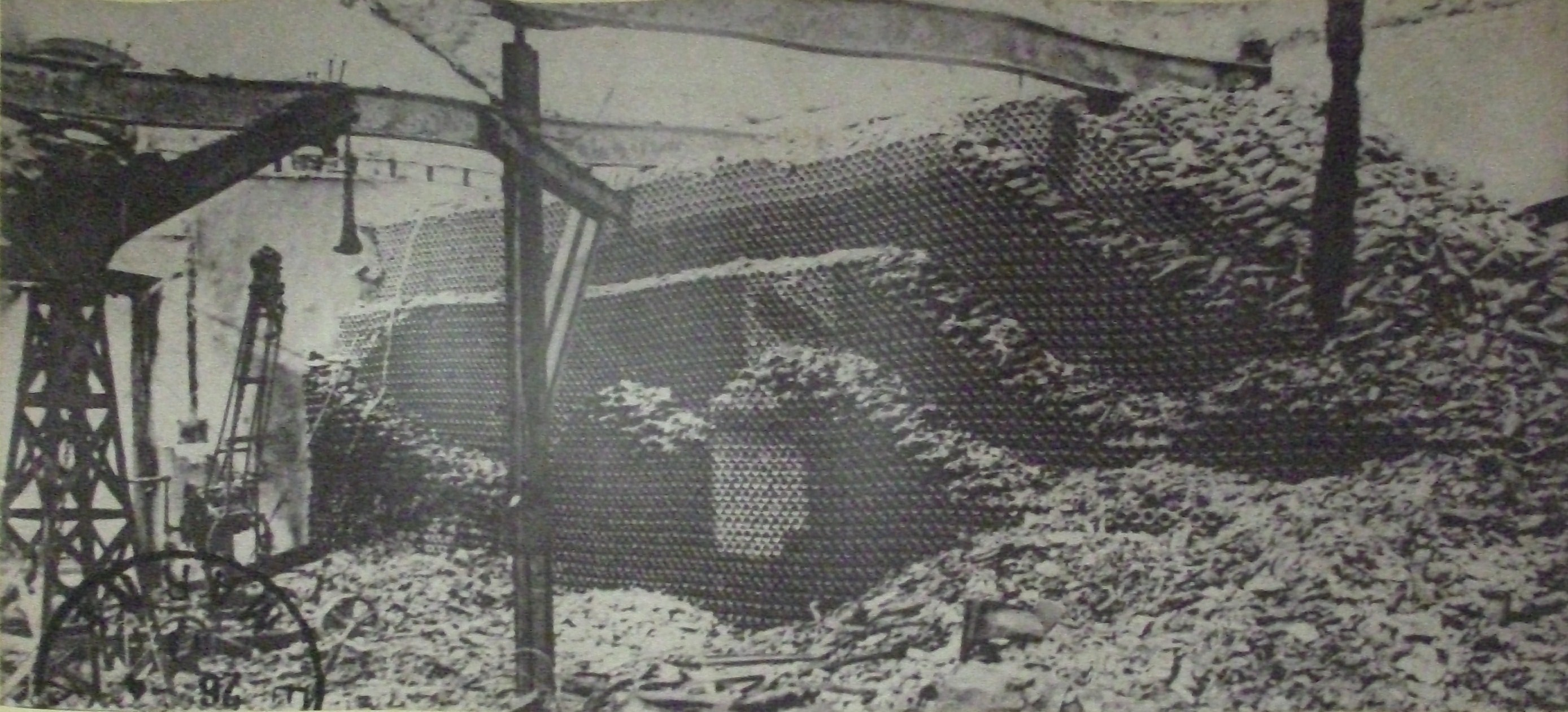 Les destructions à Ay, la maison Ayala.